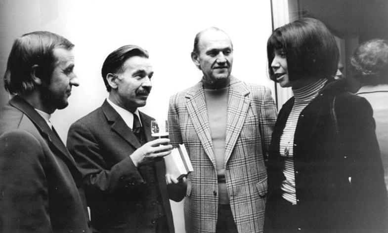 ADN-ZB Katschorowski 16.11.73 Berlin: VII. Schriftstellerkongreß. Der Schriftstellerverband der DDR beendet am 16.11.73 seine dreitägigen Beratungen in der Berliner Kongreßhalle am Alexanderplatz. In den Pausen kommt es immer wieder zu Gesprächen der Delegierten und Gäste - auf unserem Foto zwischen Irmtraud Morgner, Franz Fühmann, Jan Koprowski, Vorsitzender der Auslandskommission der Leitung des Polnischen Schriftstellerverbandes, und dem Übersetzer Kurt Kelm (v.r.n.l.).